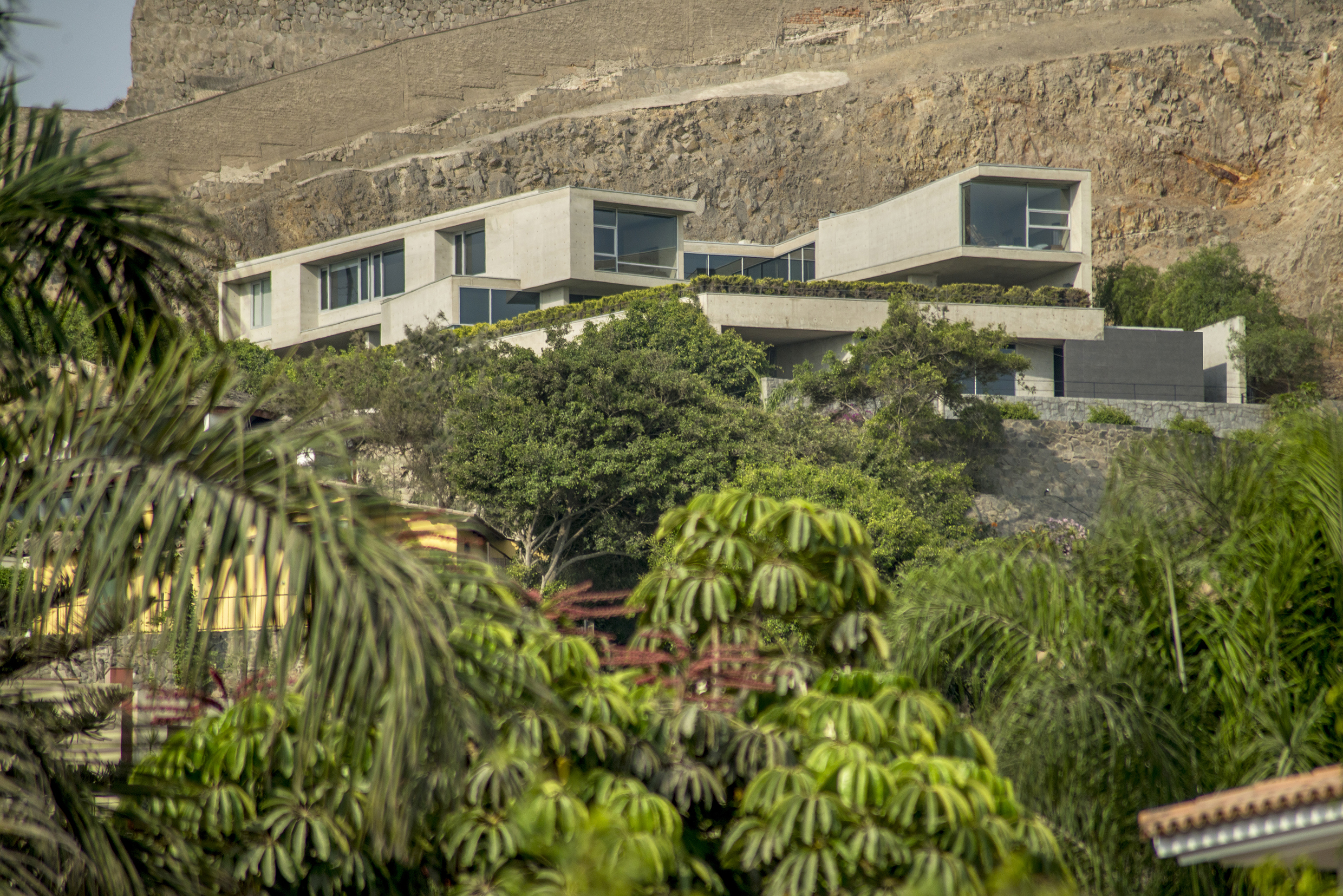 Proyecto en contexto, Alfredo Benavides y Cynthia Watmough